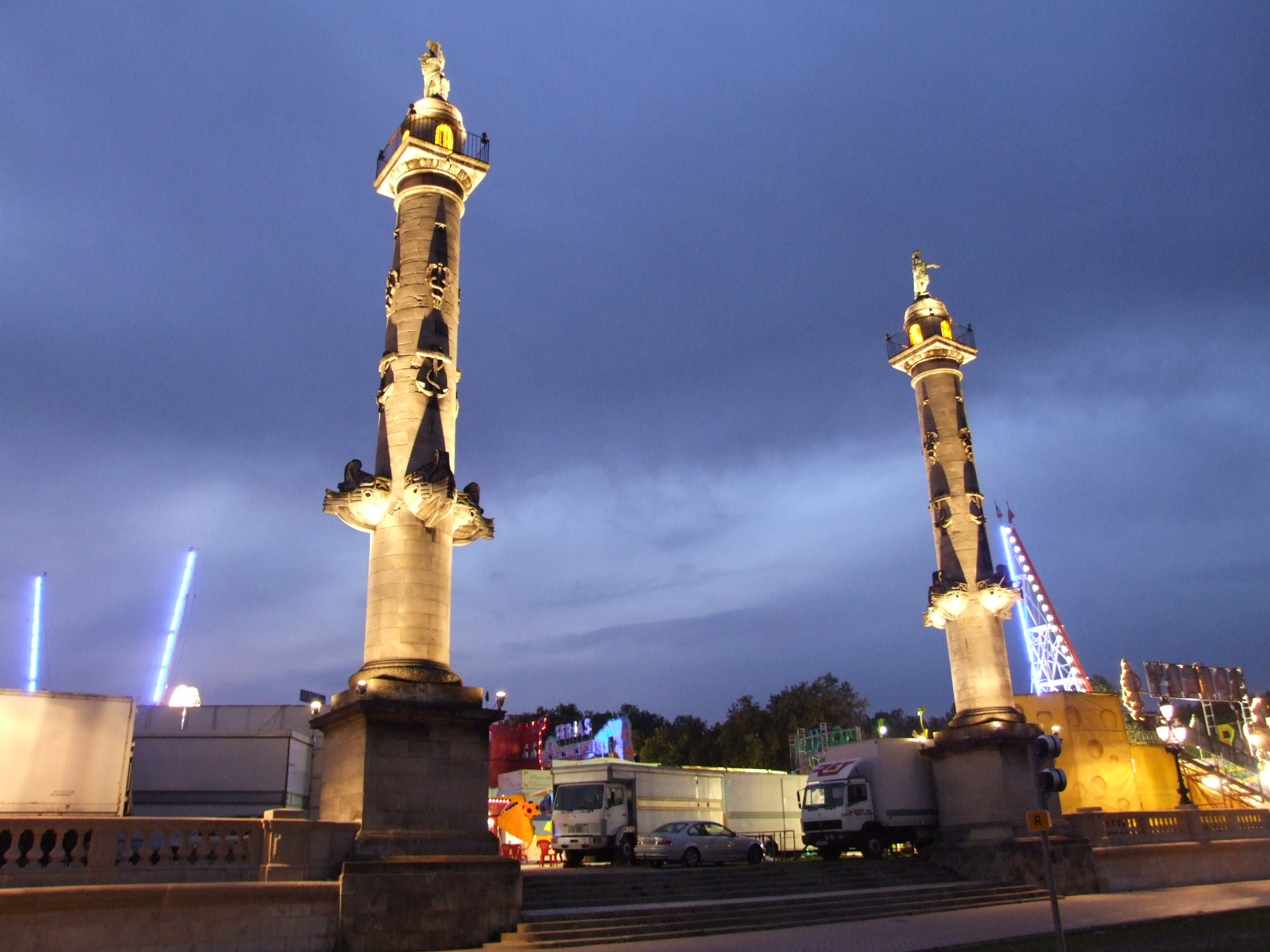 Colonnes rostrales, Bordeaux, Gironde, FRANCE